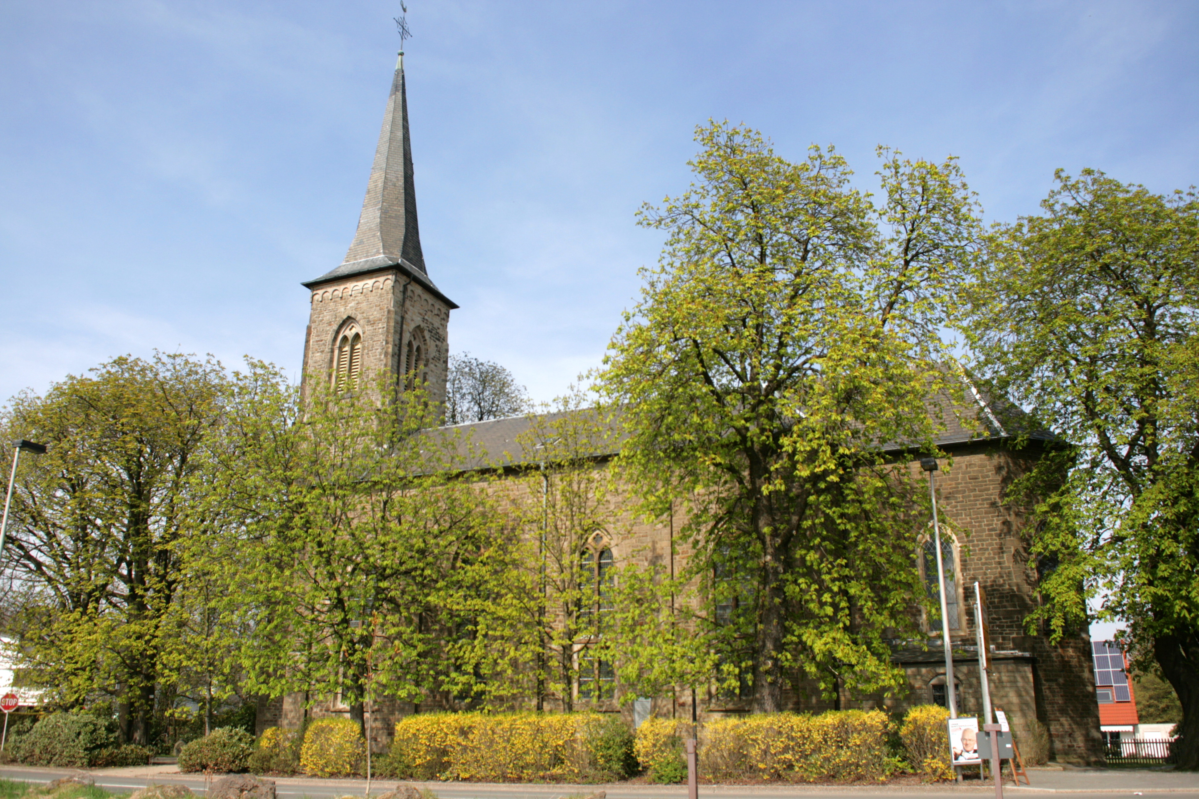 Kirche Herzkamp, Barmer Straße in Sprockhövel